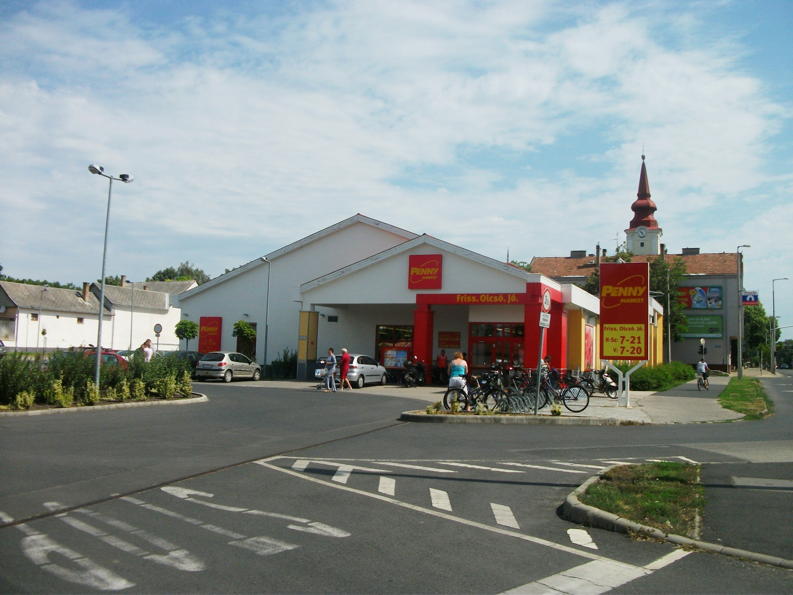 A Penny Market diszkontáruház-lánc üzlete Hajdúszoboszlón.